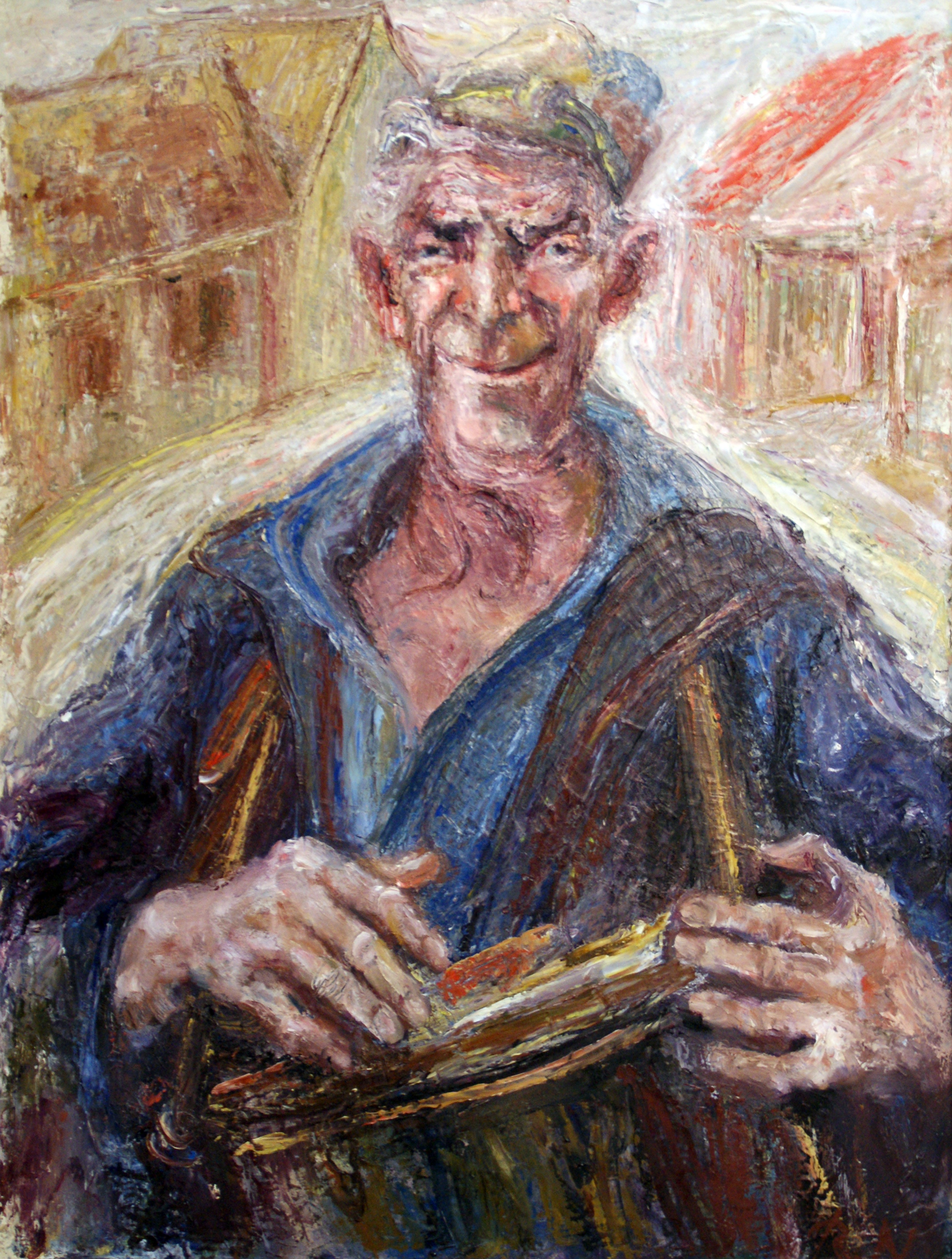 Das Werk wird in zwei Kunstkatalogen des Kunstarchiv Beeskow beschrieben.